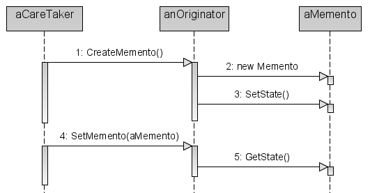 The Memento design pattern UML diagram, sequence1